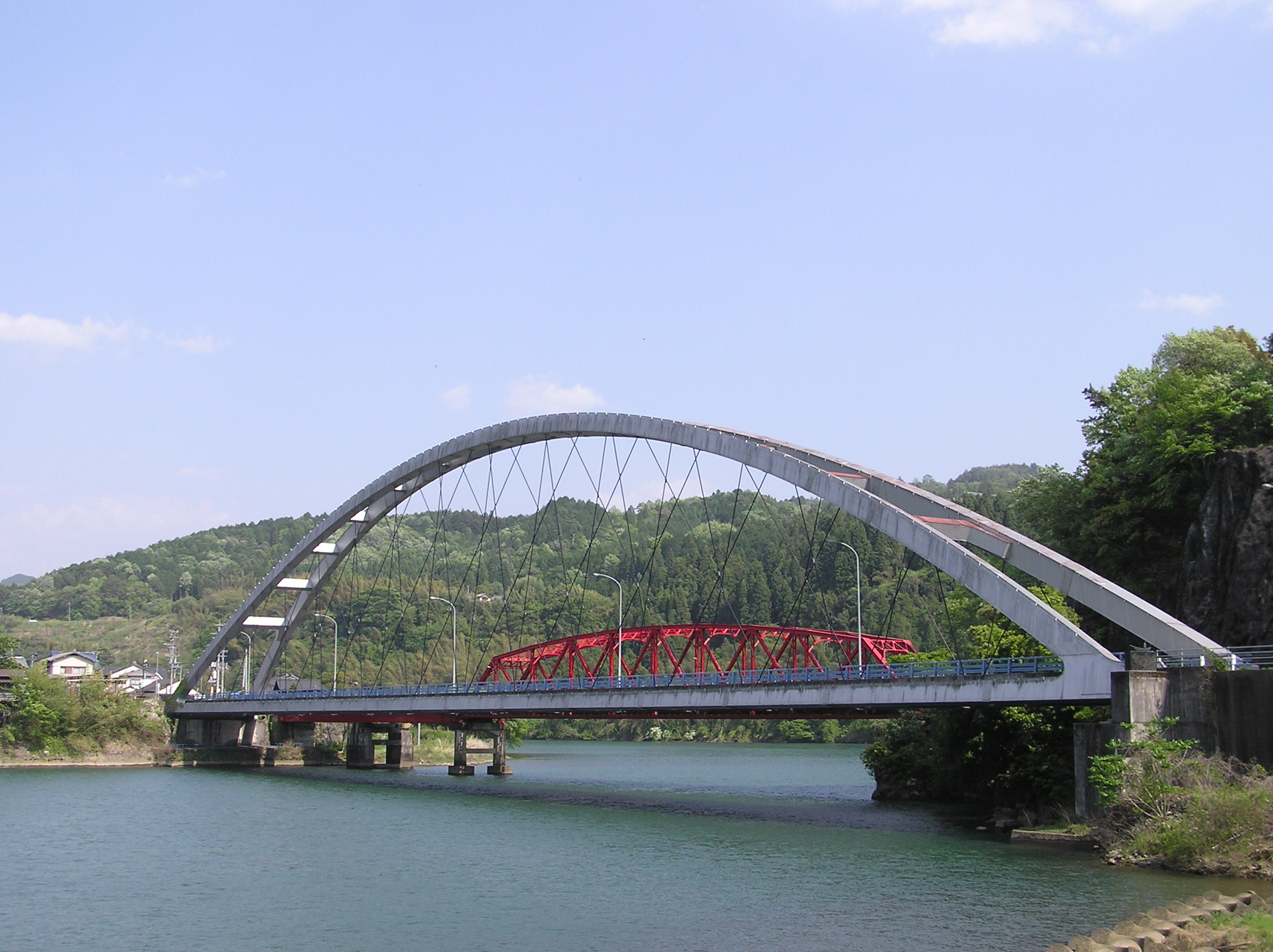 八百津橋（岐阜県加茂郡八百津町）：通称「新八百津橋」側。